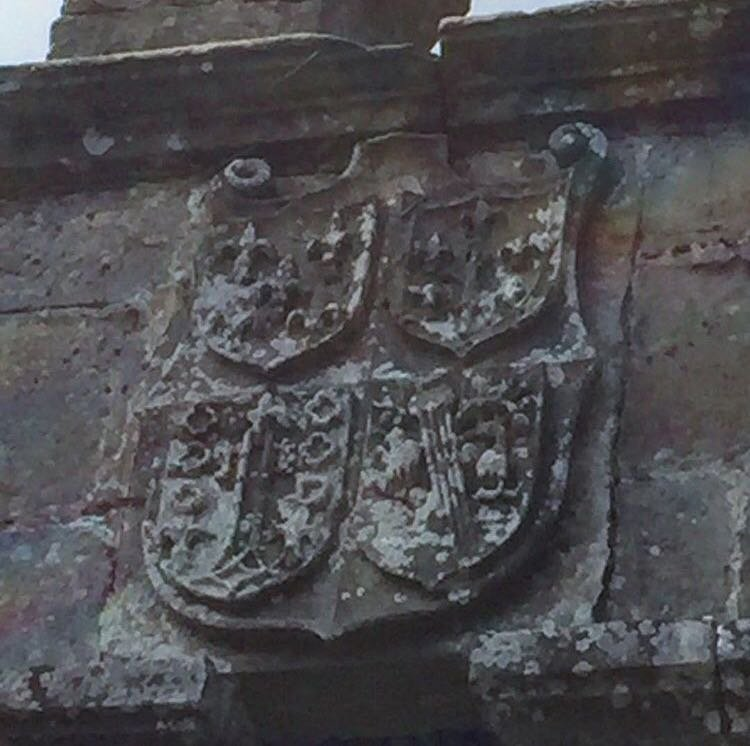 Escudu d'armes de Rúa, Ponte, Quirós y Gráu, nel palaciu de Valdecarzana en Muros.